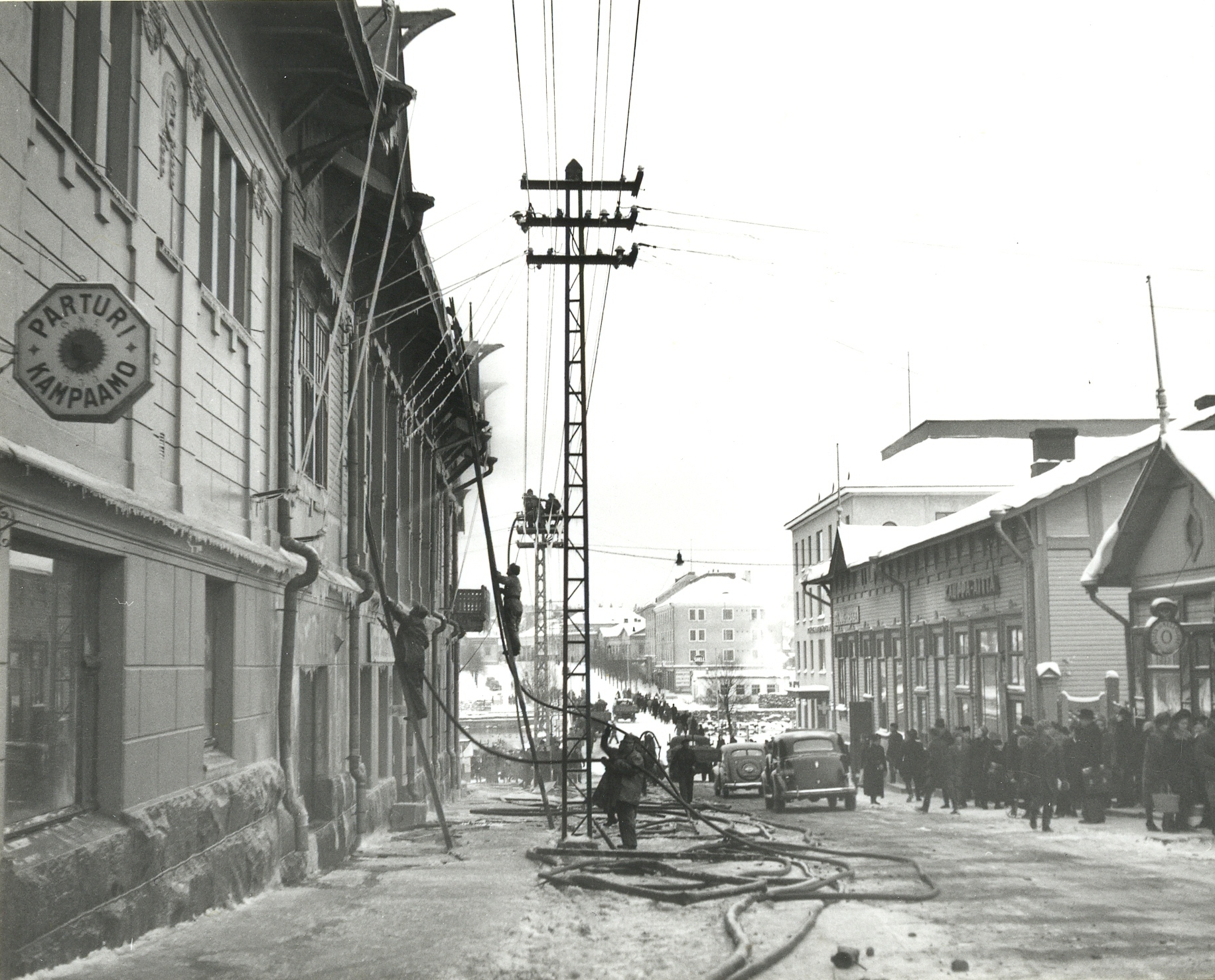 Seurahuoneen (Olavinkatu 40) tulipalo. Näkymä Olavinkatua pitkin länteen.